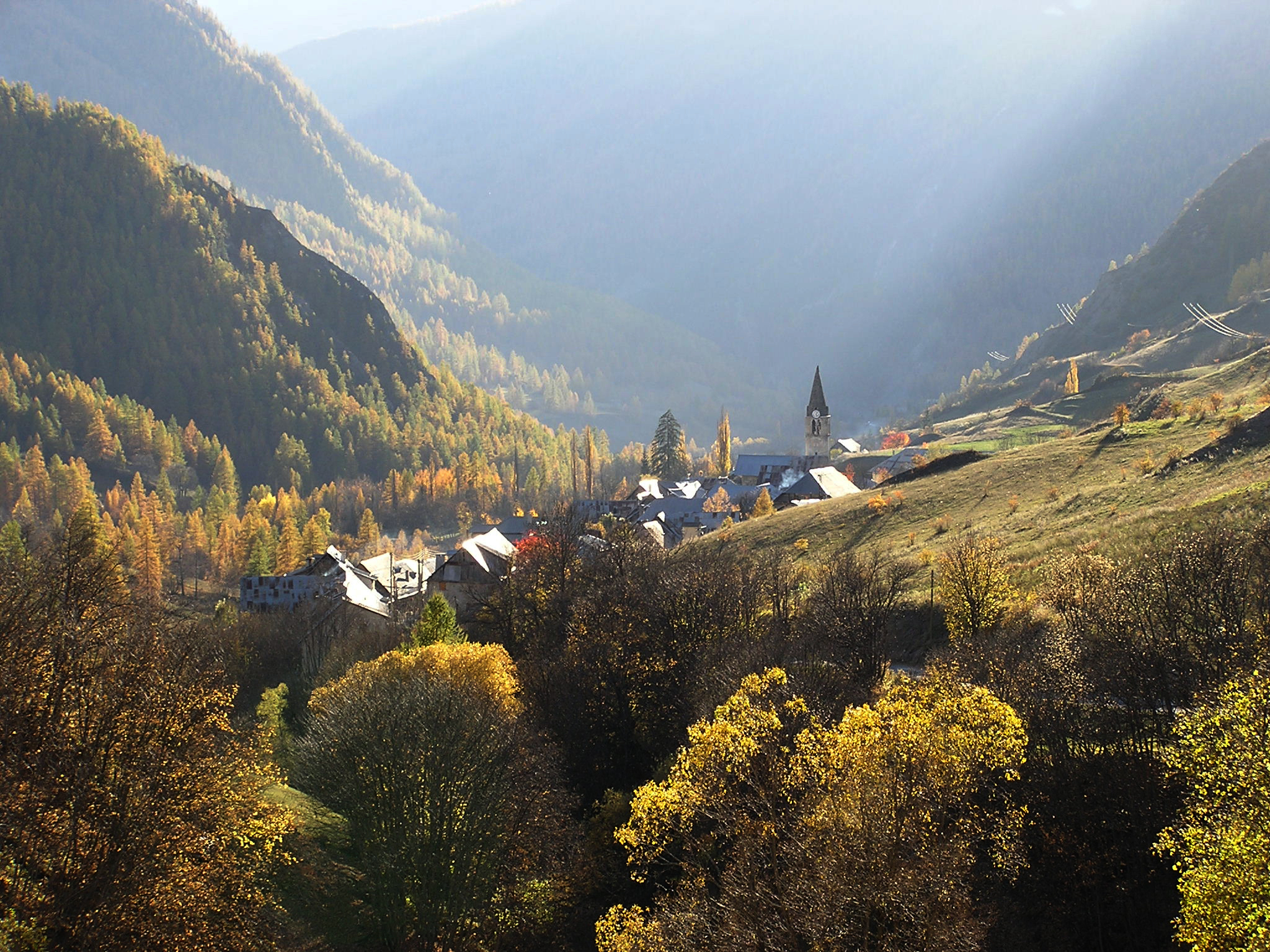 "Le village de Saint Paul sur Ubaye"